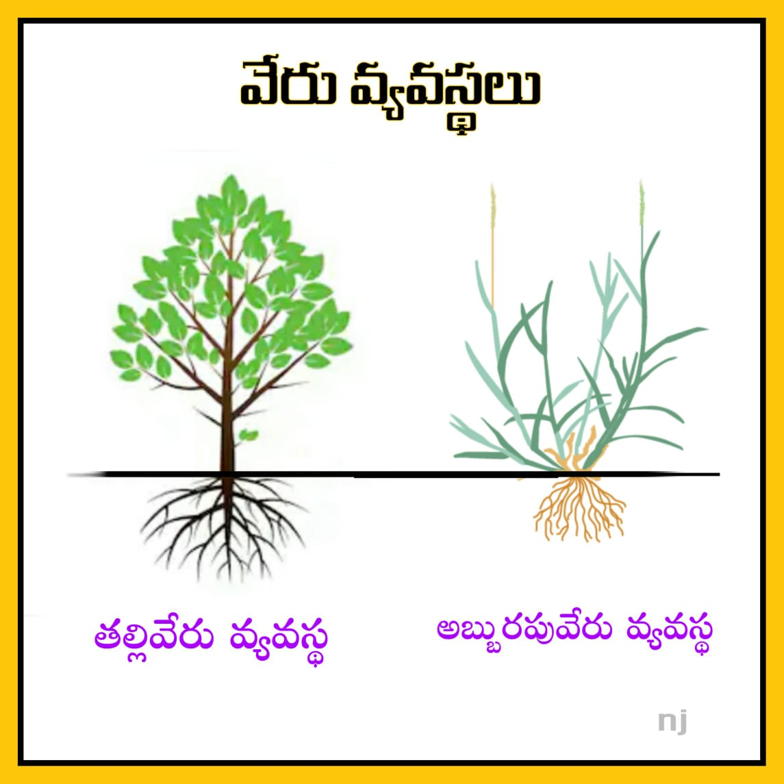 మొక్కలలో వేరు వ్యవస్థలు